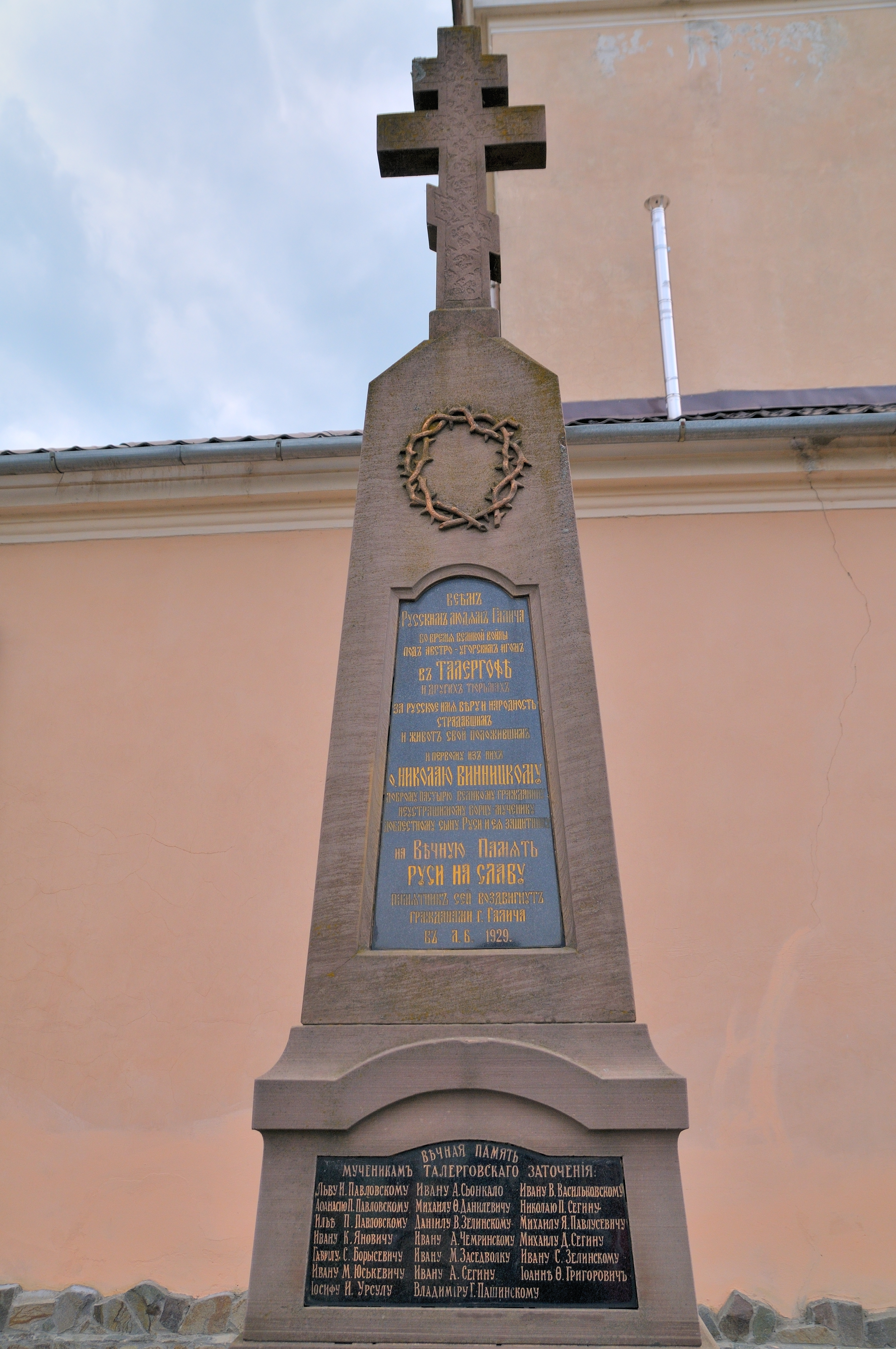 Церква Різдва Христового, Галич, майдан Різдва